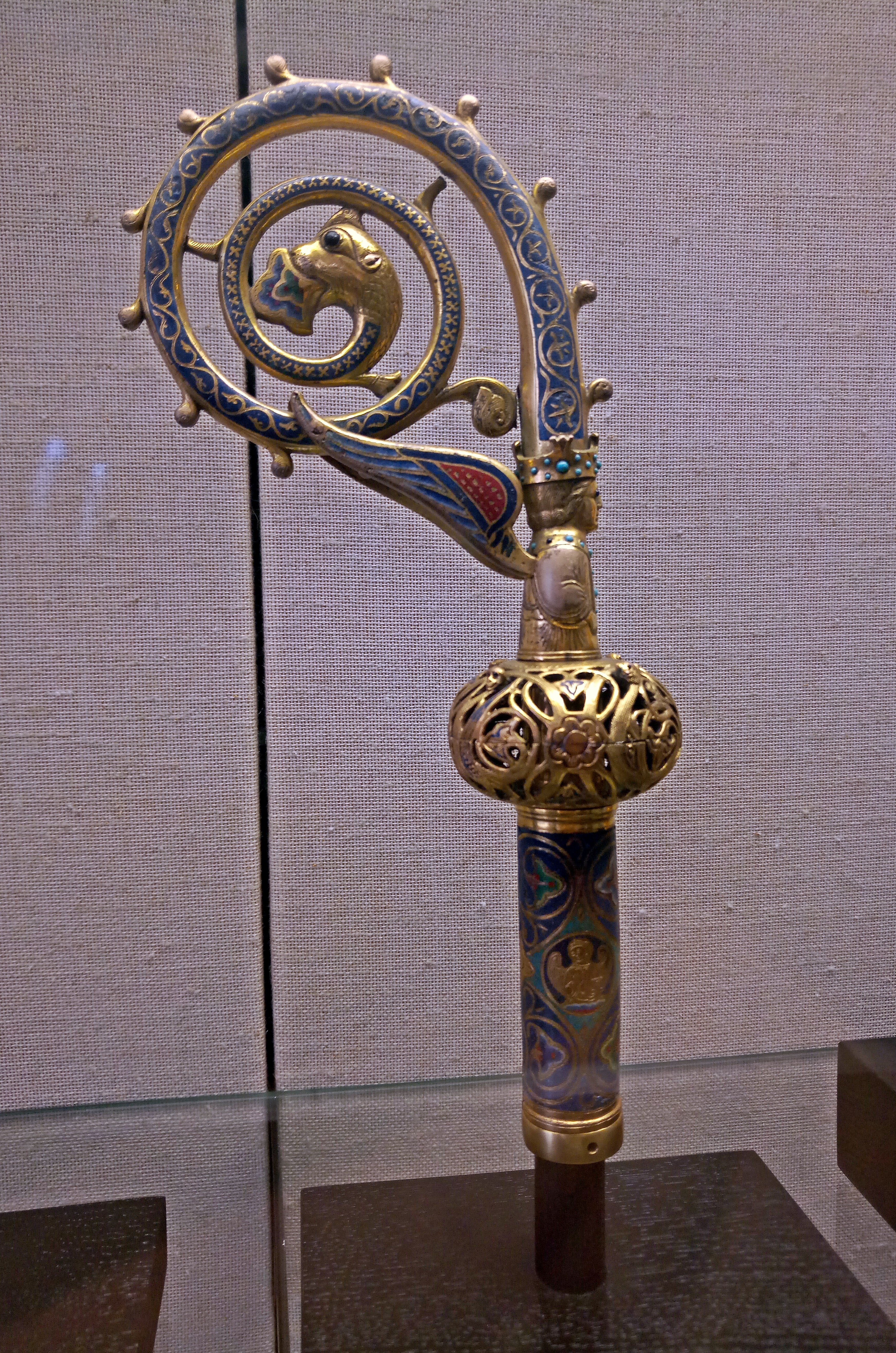 Domschatzkammer Trier Krümme, Bischofsstab Heinrich von Finstingen (+ 1286)